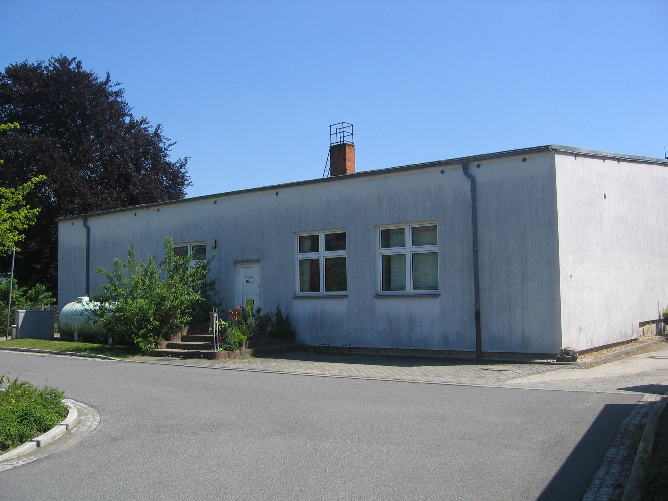 Ruhland, Berliner Str. 19a, Westansicht